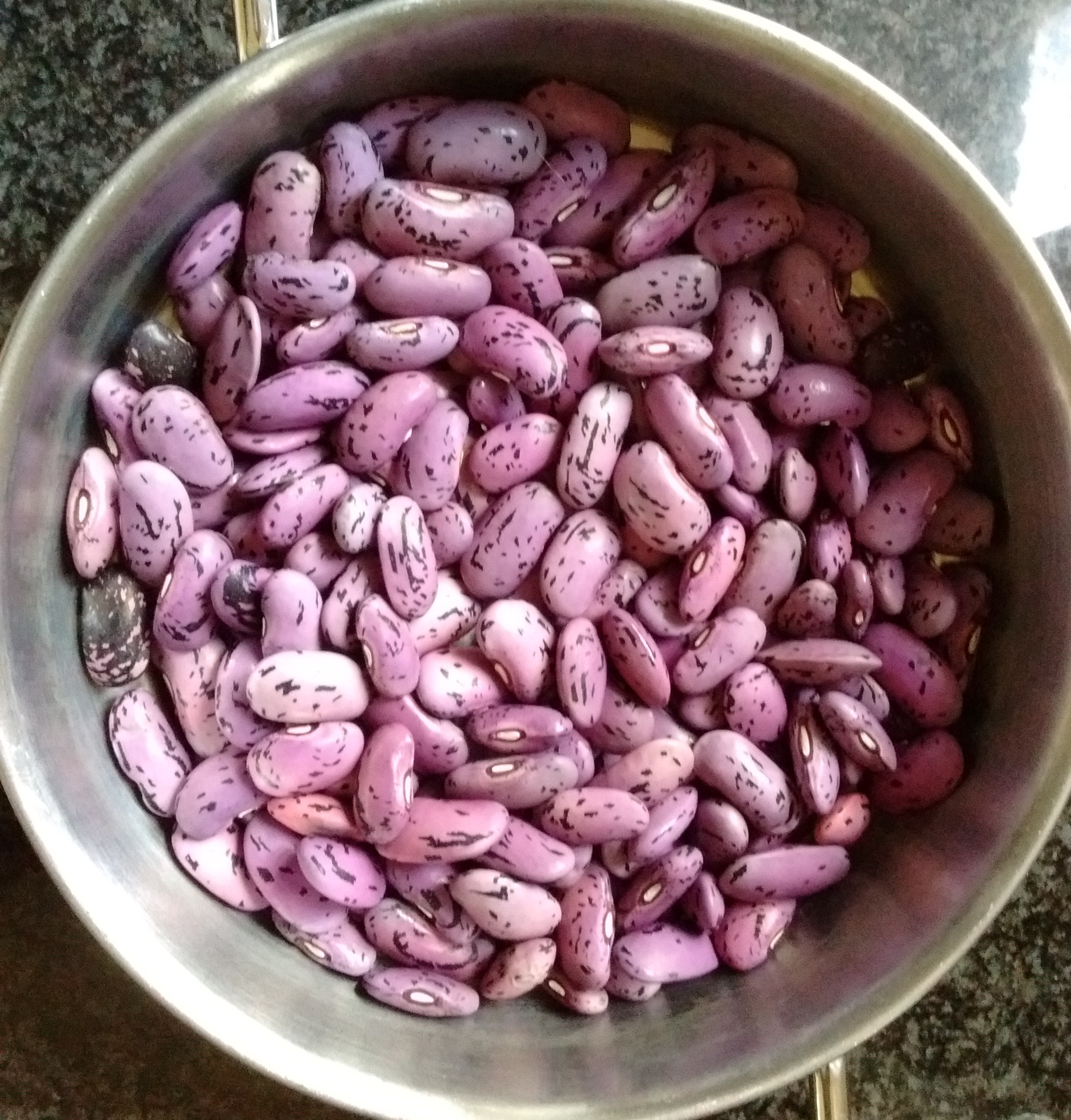 Pronkbonen uit eigen tuin: paarse zaden met zwarte spikkels